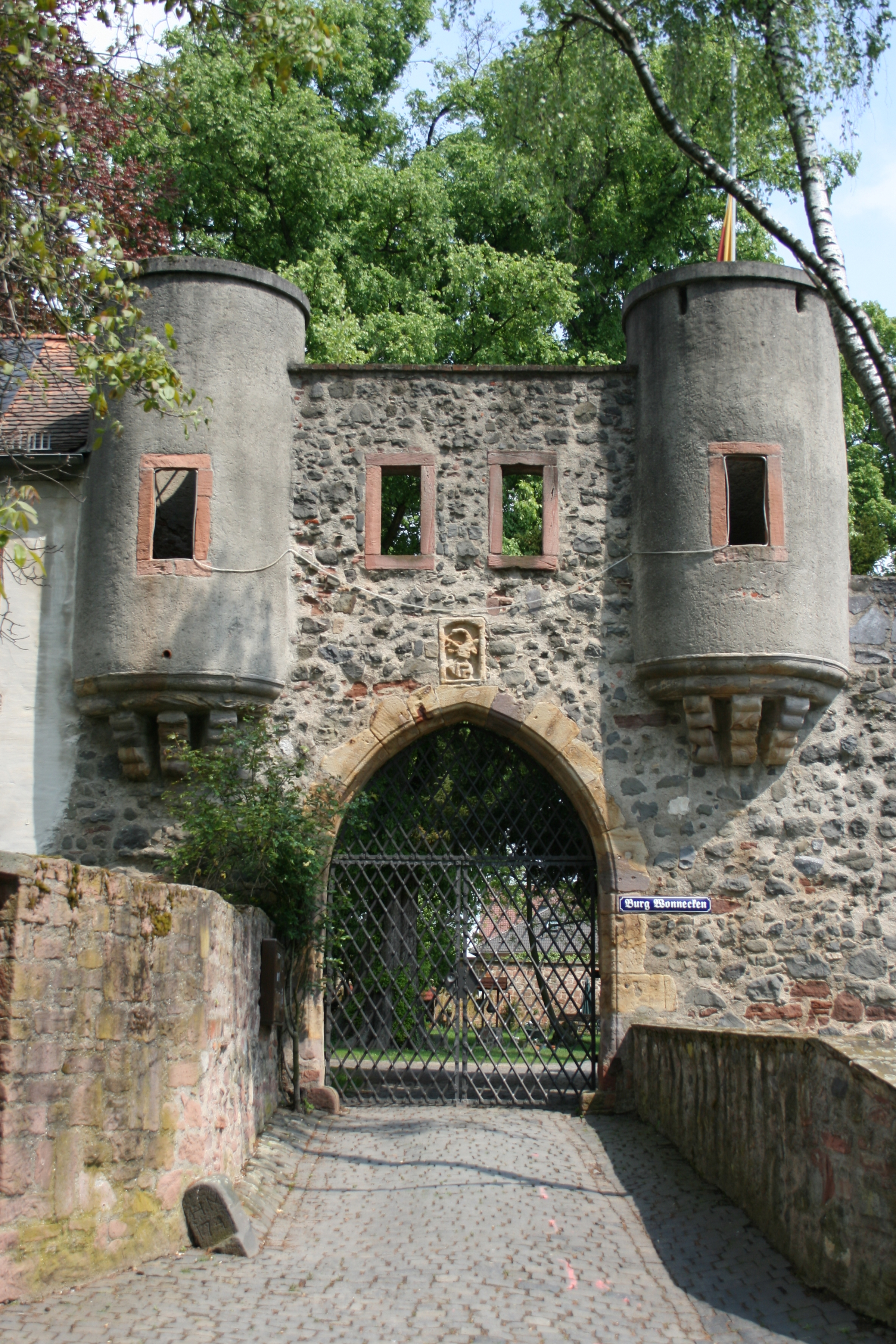 Inneres Burgtor der Burg Windecken in Hessen.